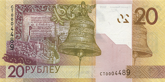 20 белорусских рублей образца 2009 года (оборотная сторона)